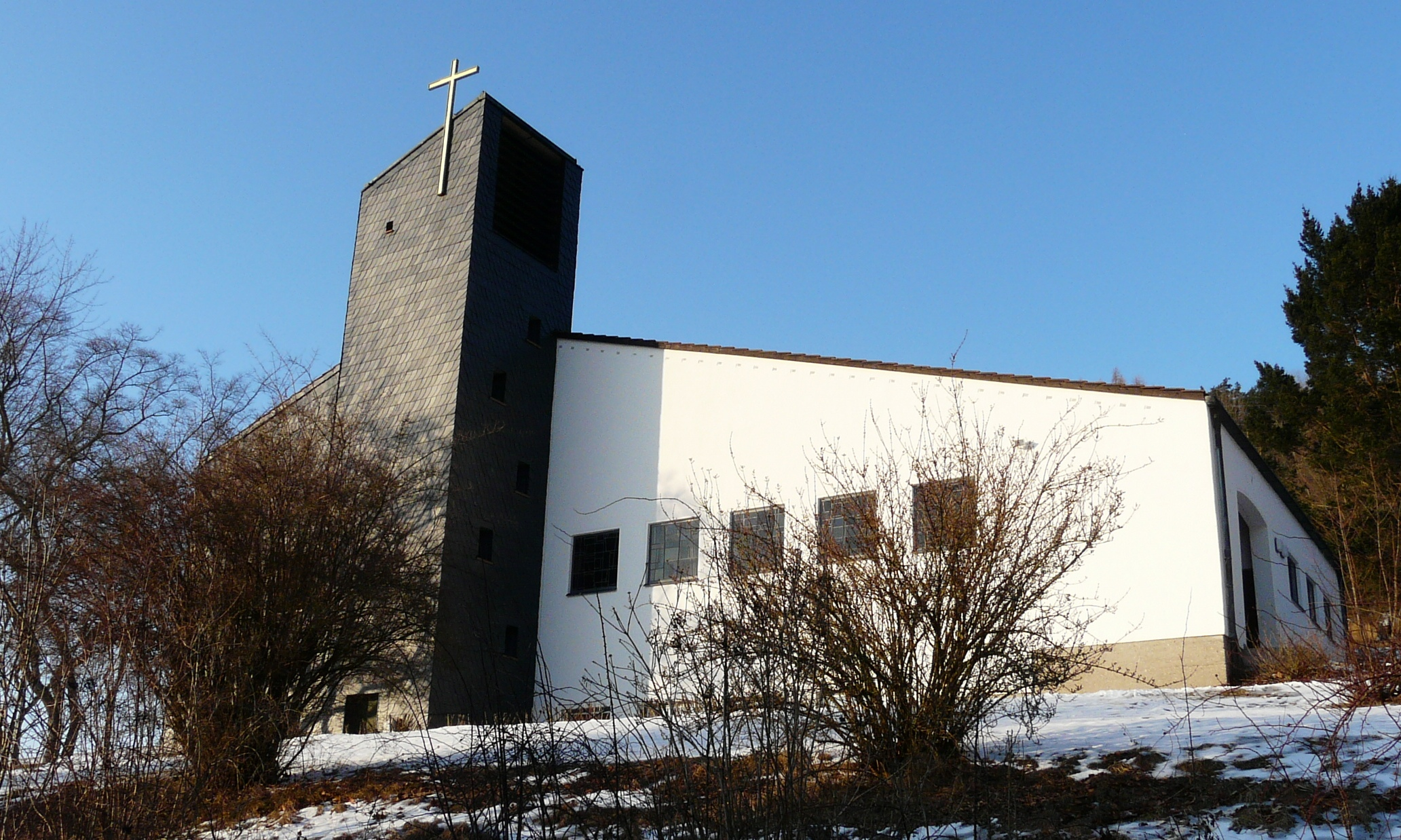 Goldkronach, Katholische Kirche St. Michael am Leisauer Berg